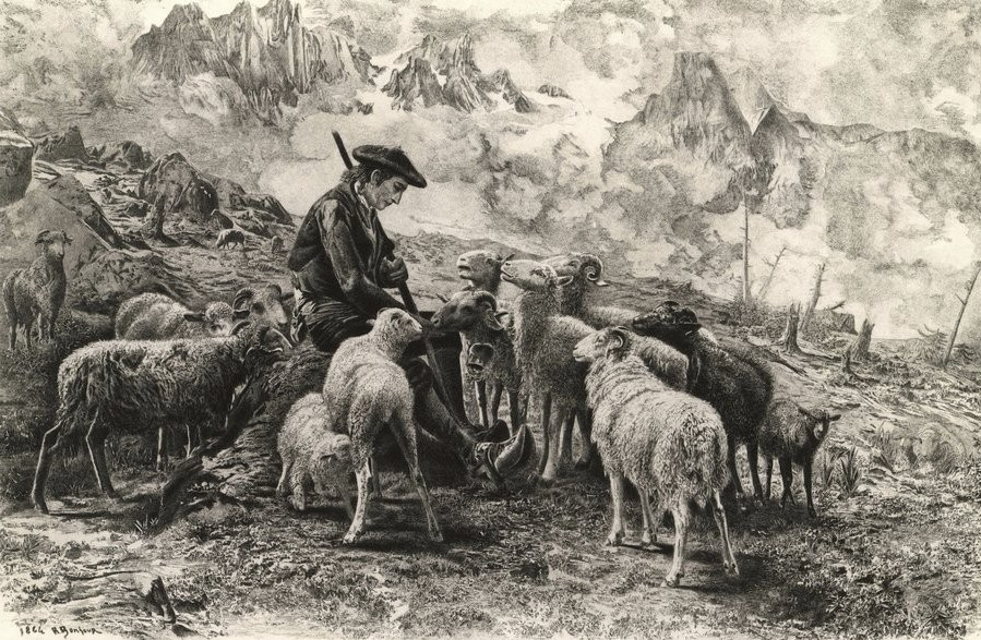 Berger avec son troupeau